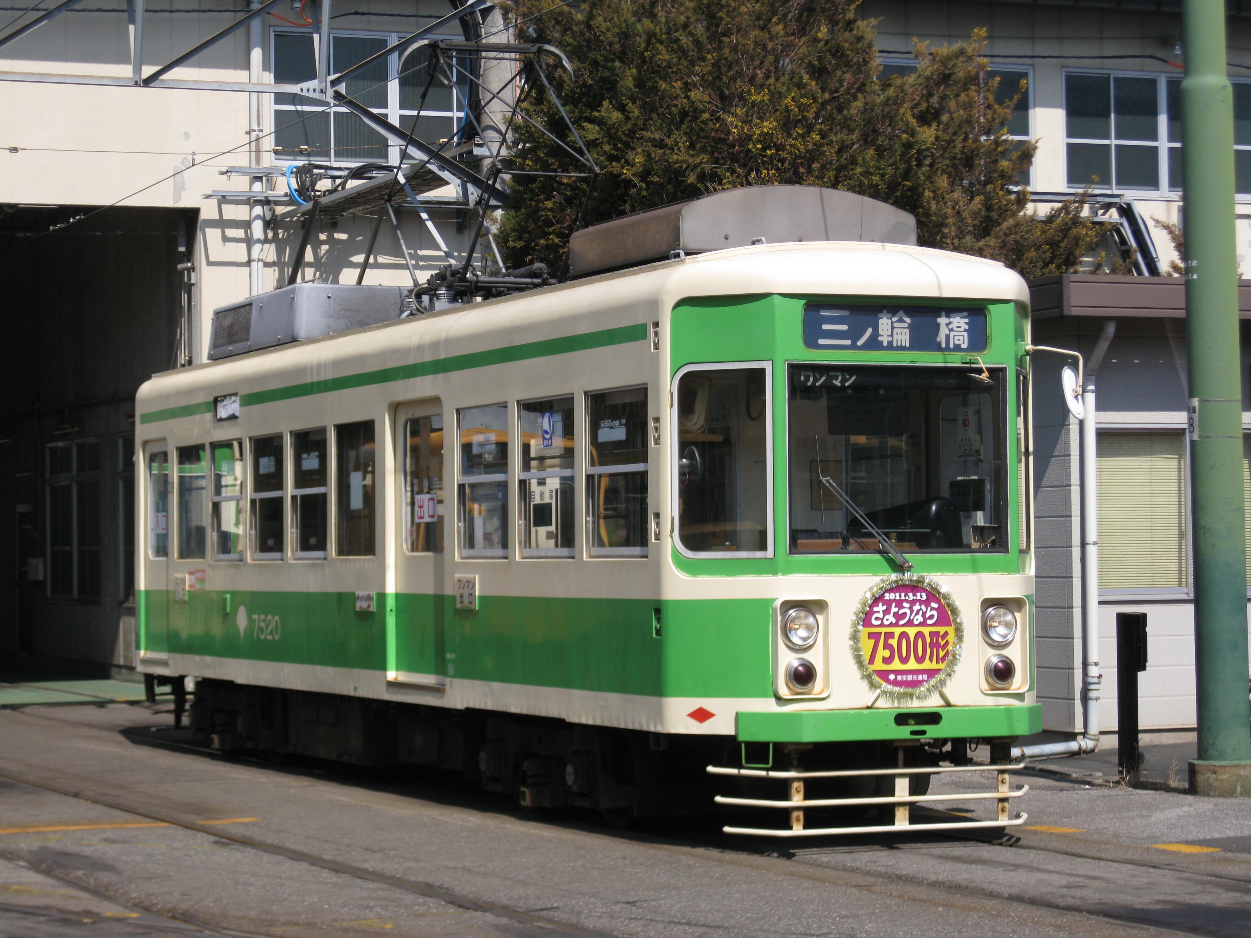 3月13日に行われた、7520号車展示会より